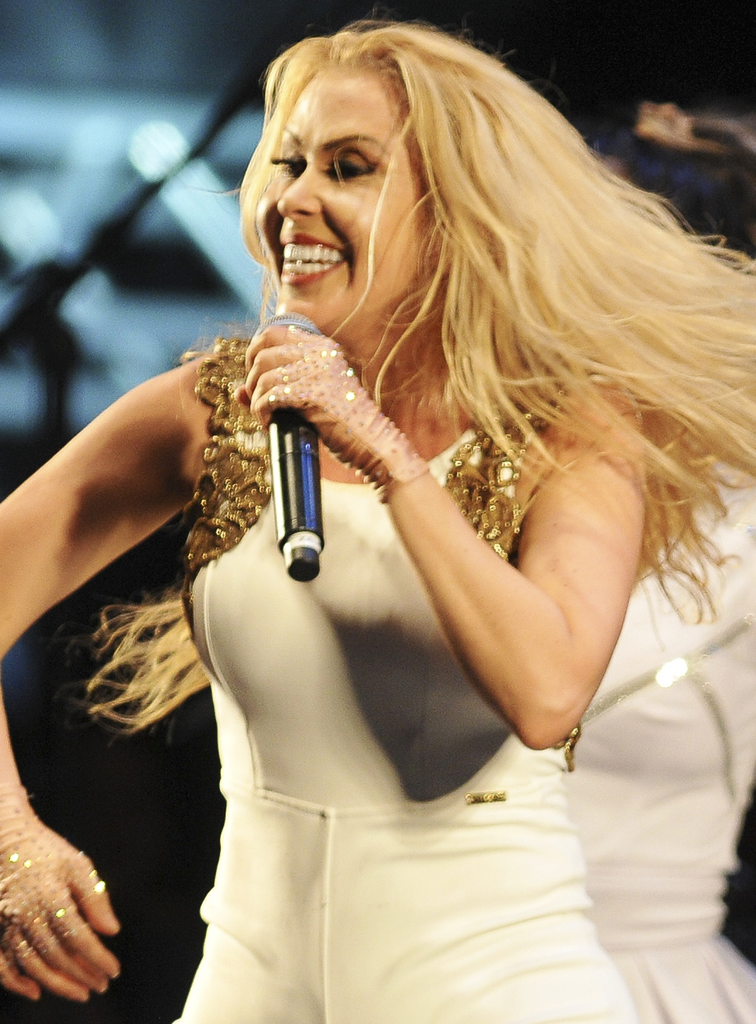 Joelma durante show de sua Avante Tour no Réveillon 2018 de Brasília.